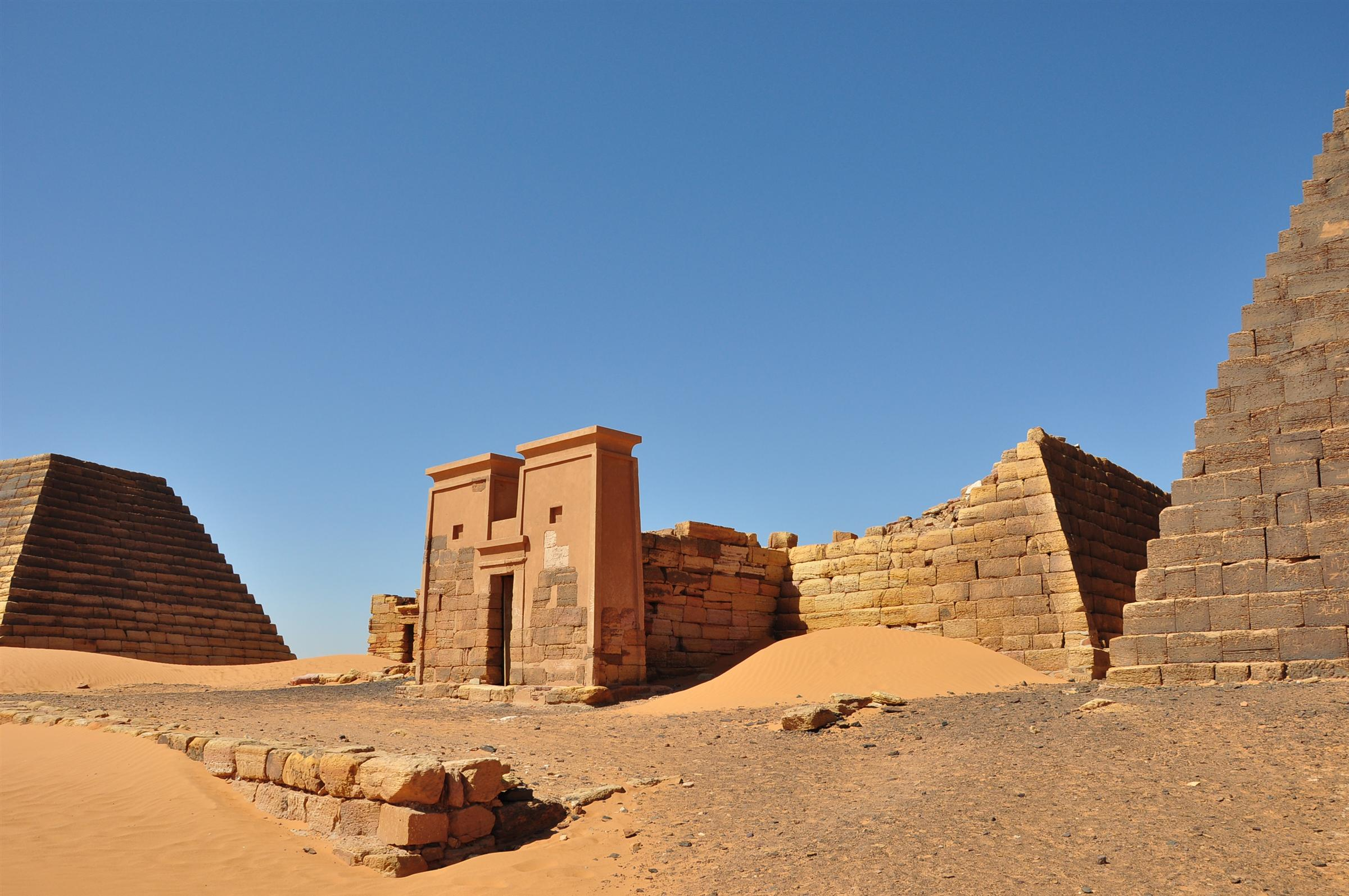 Pylon des Pyramidentempels der Kandake Amanishakheto